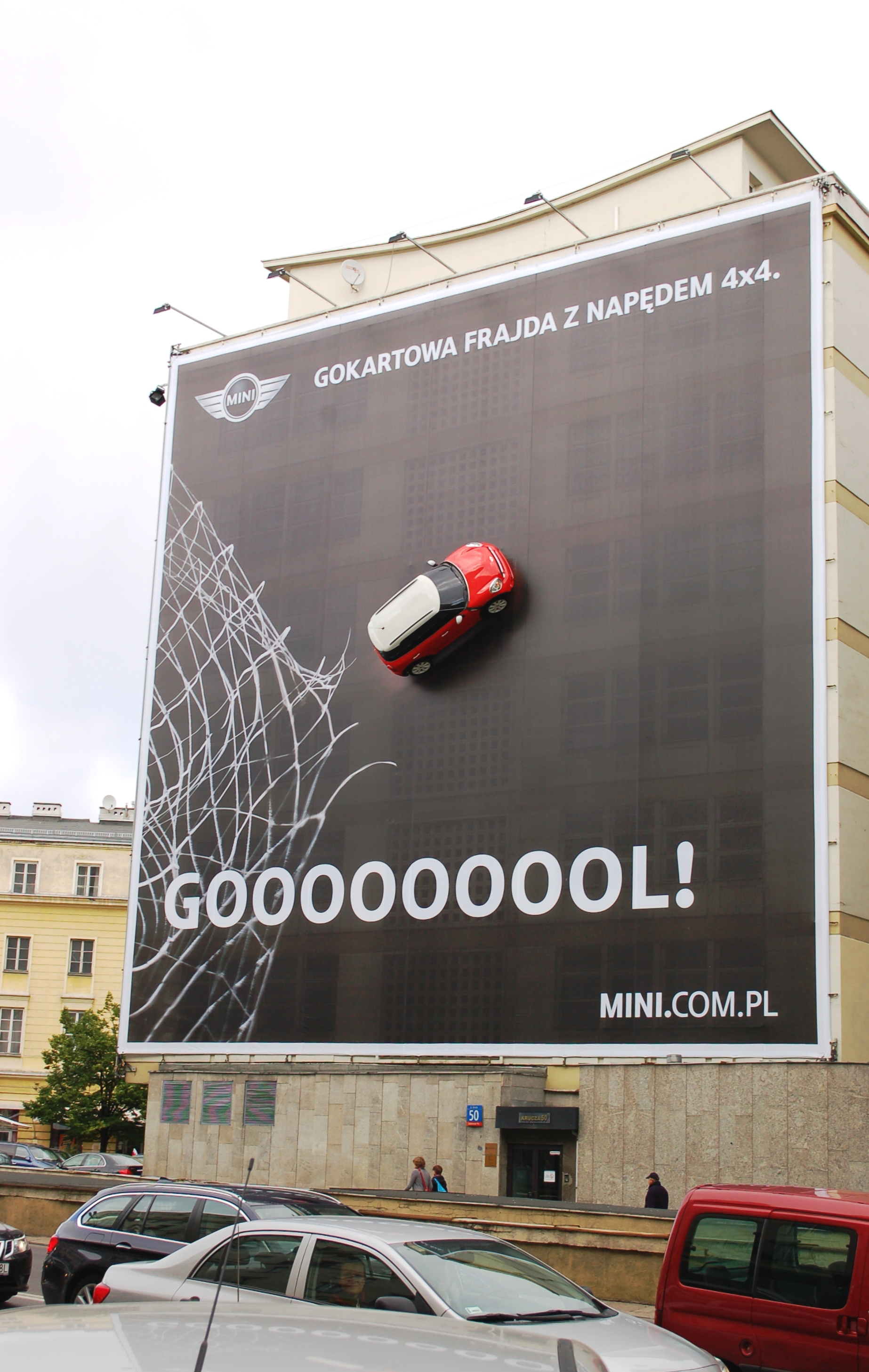 Warschau Krucza, Mini